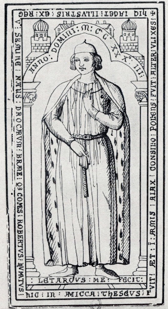 Robert III, count of Dreŭ